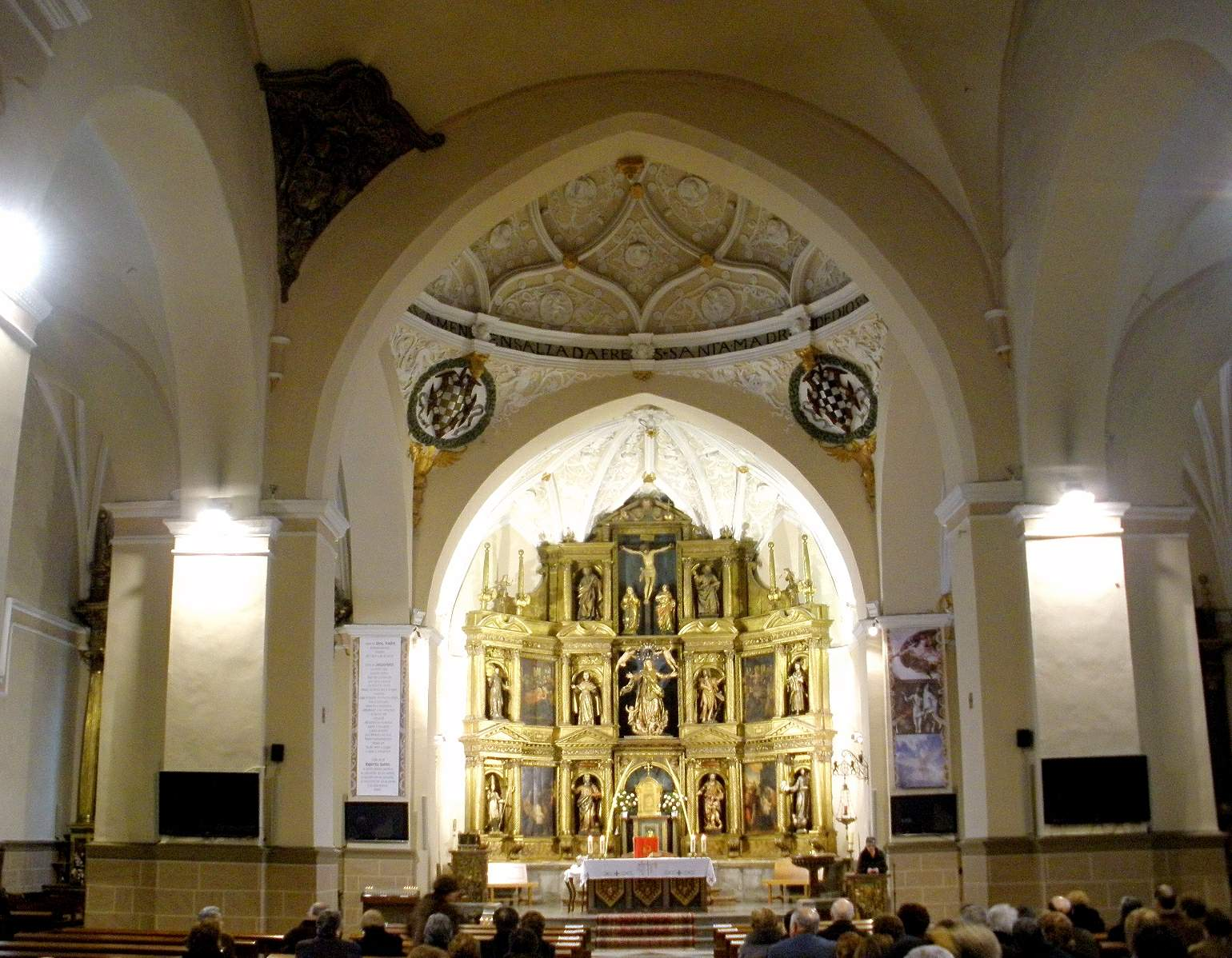 Iglesia de Santa Maria (La Bañeza)